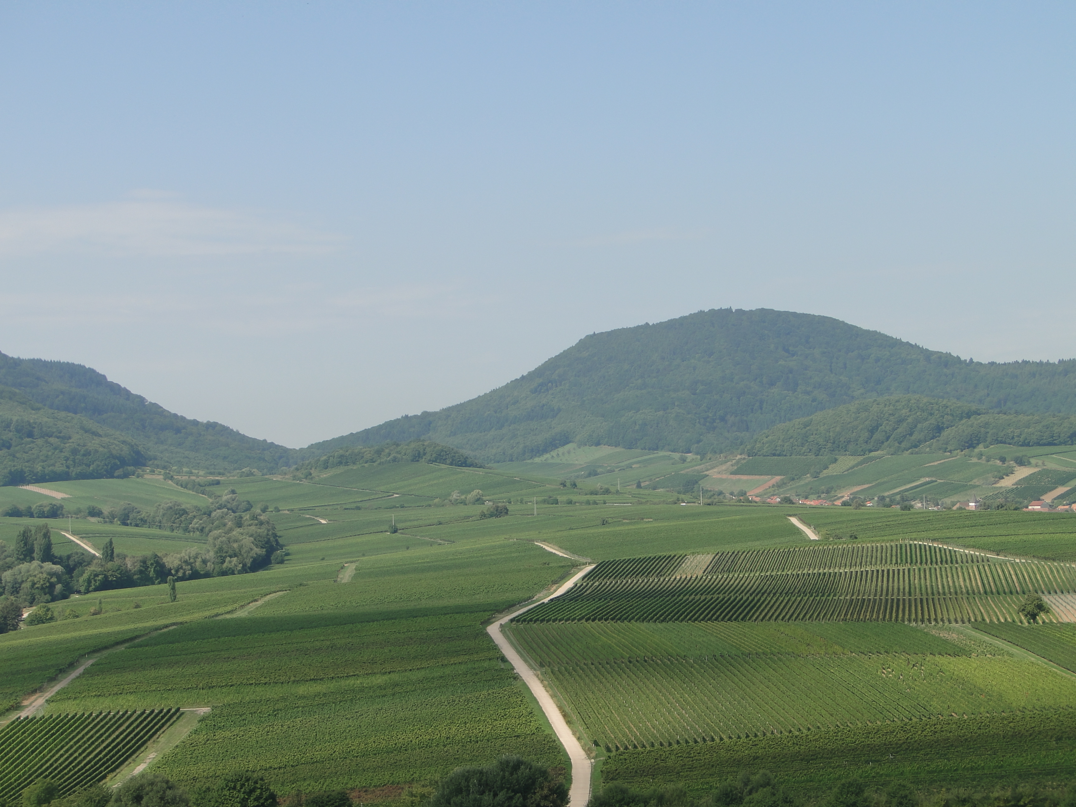 Weinberge in der Pfalz